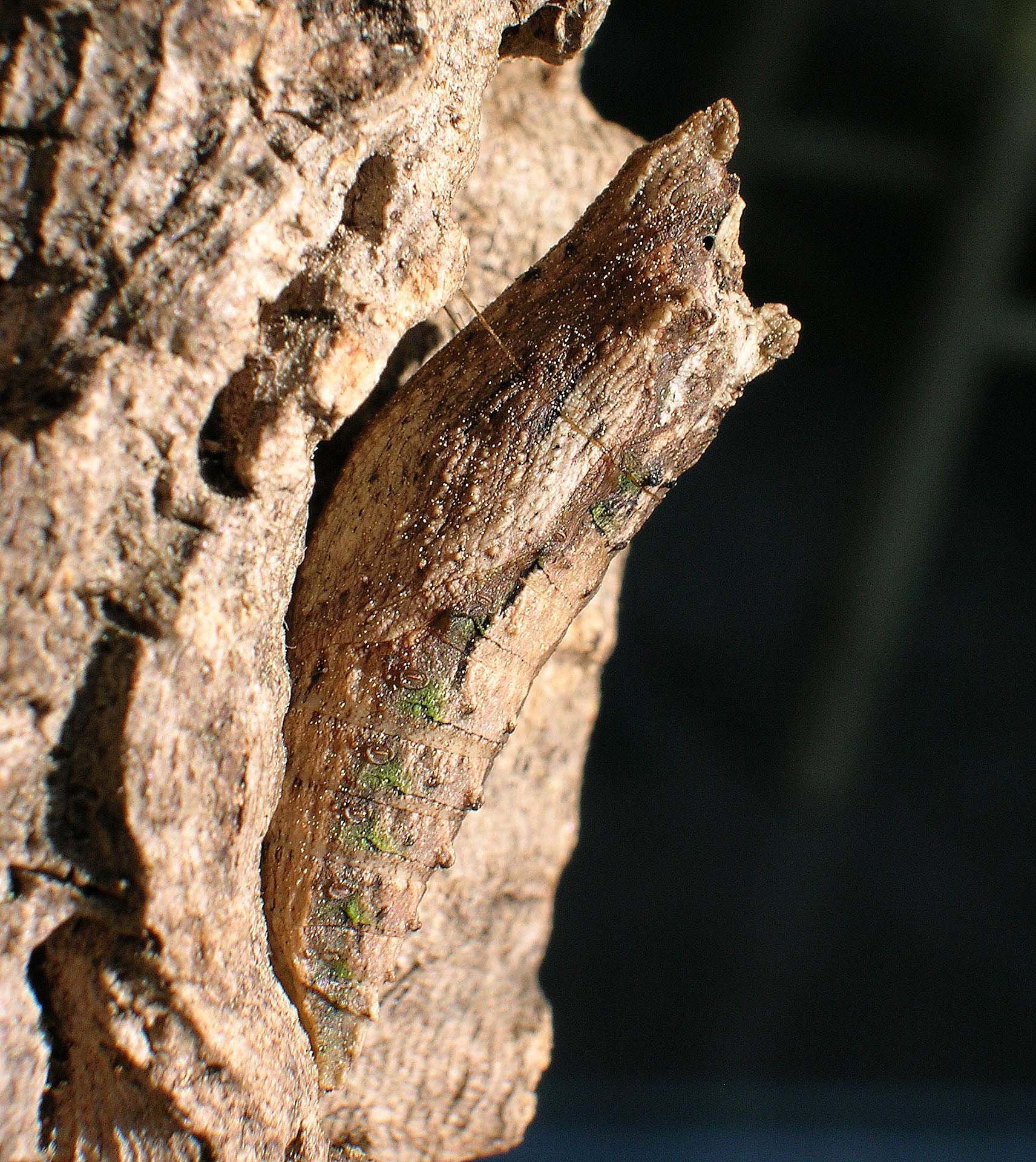 Papilio glaucus chrysalis.